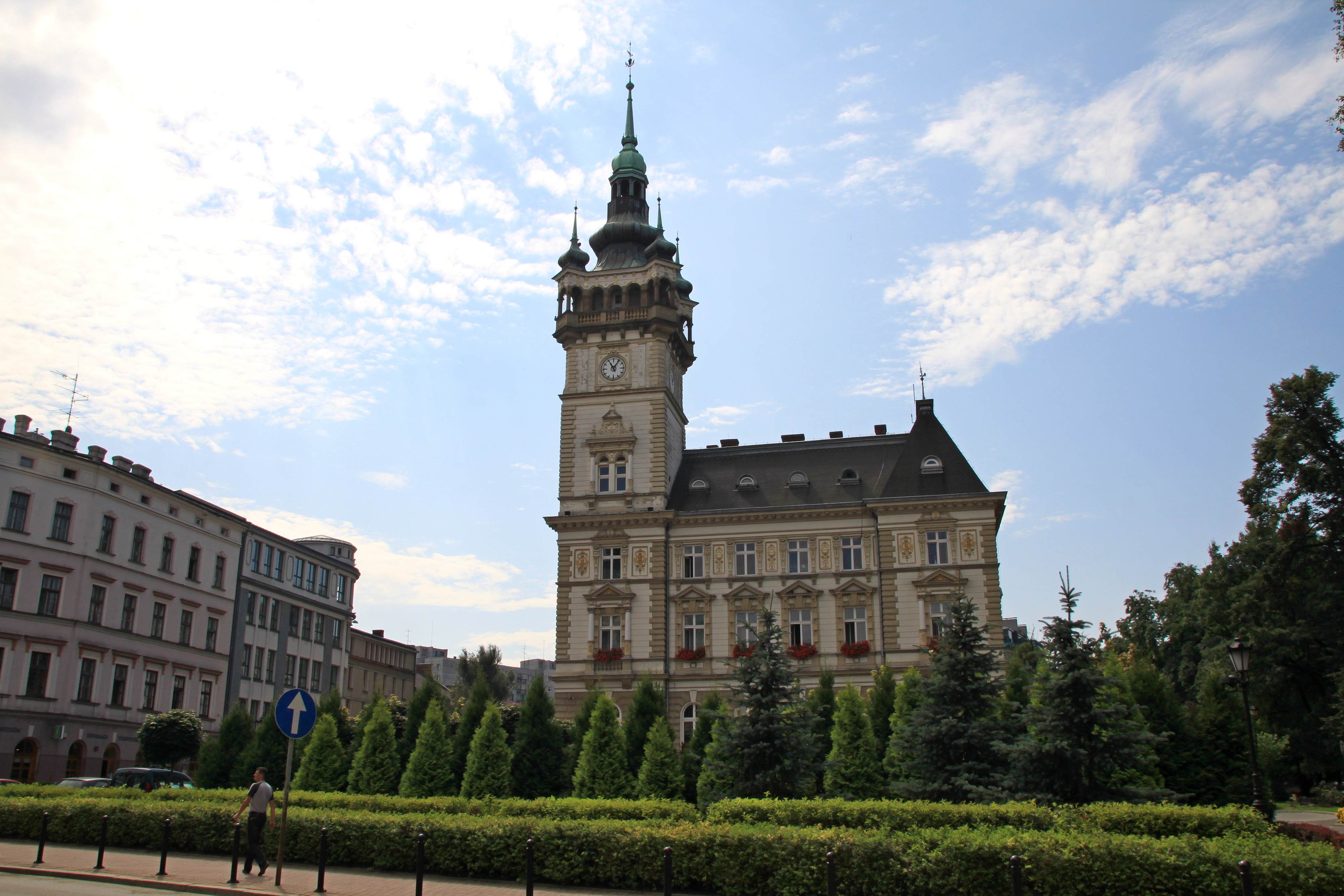 Bielsko-Biała, ratusz, 1897